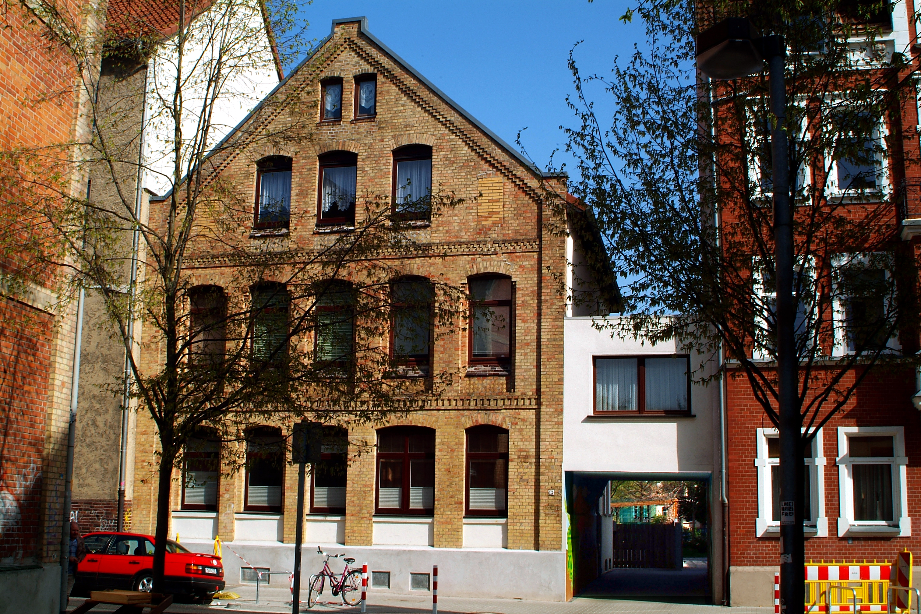 Blick auf den Durchgang von der Straße An der Strangriede zum Spielplatz an der Haltenhoffstraße.